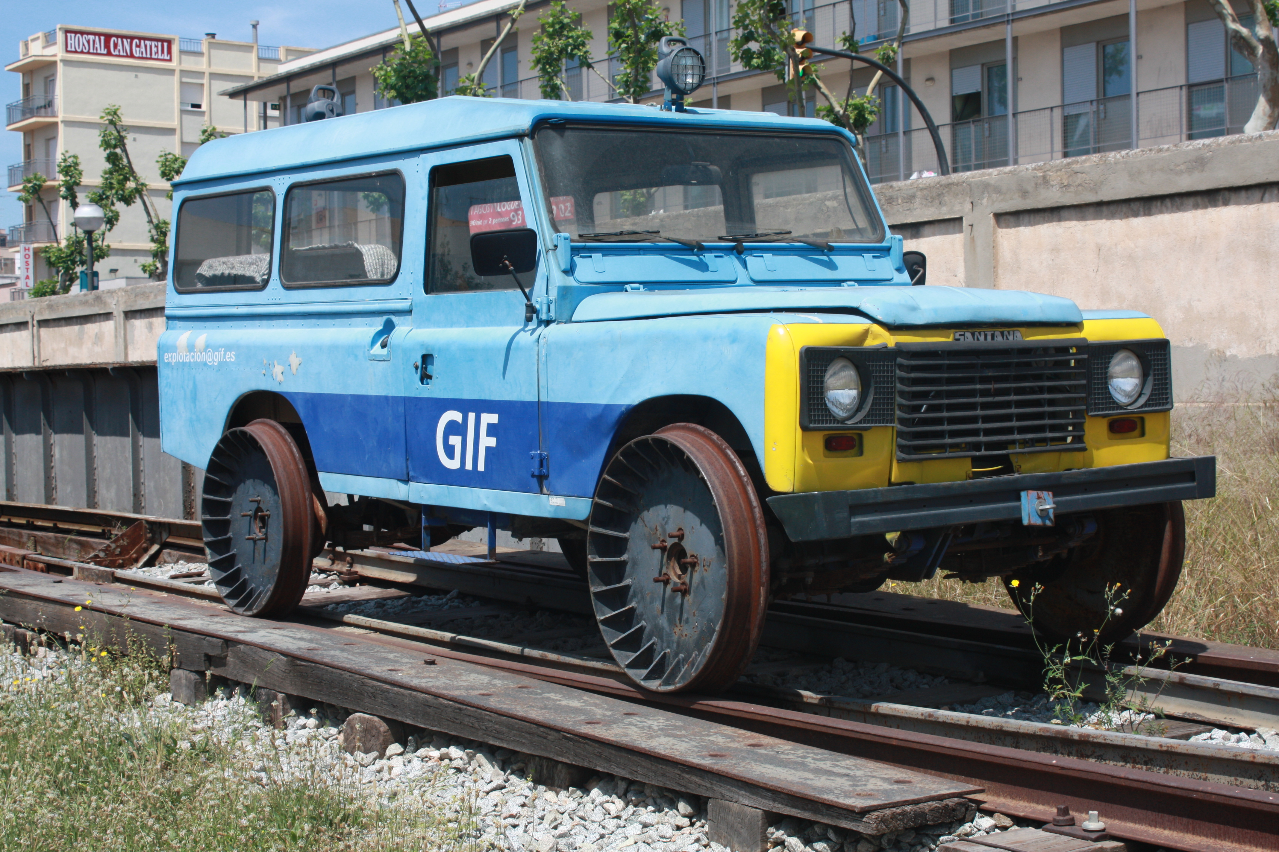 Santana Train Car